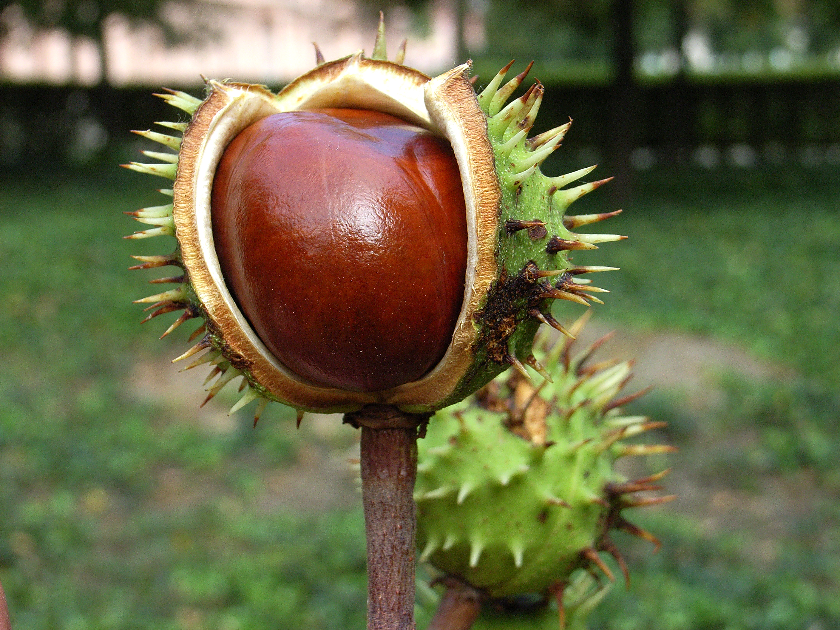 Dieses Bild zeigt eine geöffnete sowie eine ungeöffnete Rosskastanie (Aesculus).